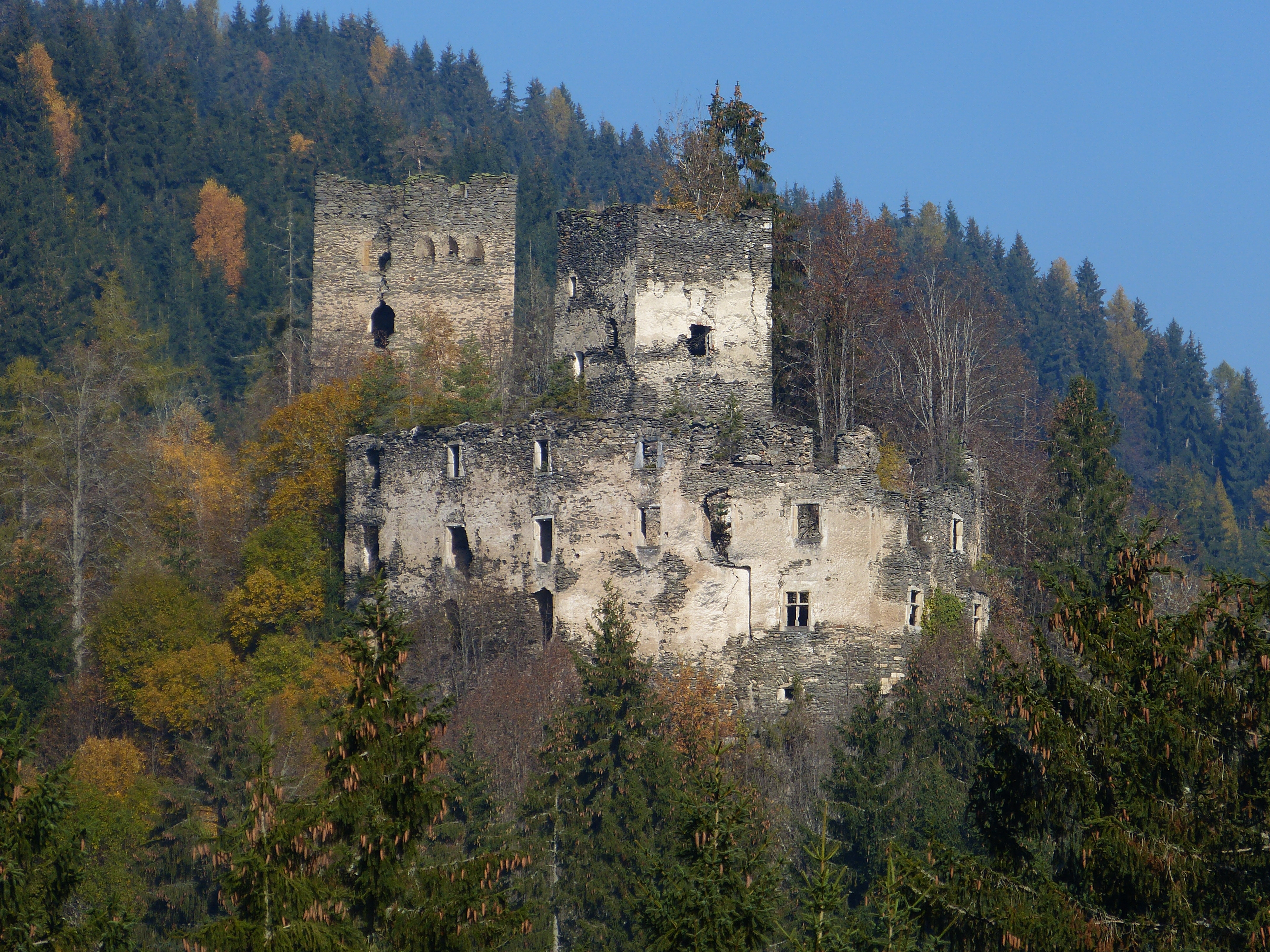 Burgruine Niederkraig: 3-stöckiger Palas und südlicher Bergfried; links dahinter nördlicher Bergfried mit Signalschlitzen.